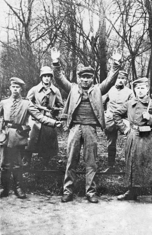 This description has been identified as biased or incorrect: In Wirklichkeit war das der Eisendreher Johann Lehner, siehe historisches-lexikon-bayerns.deGeiselmörder Seidl 1. Mai 1919